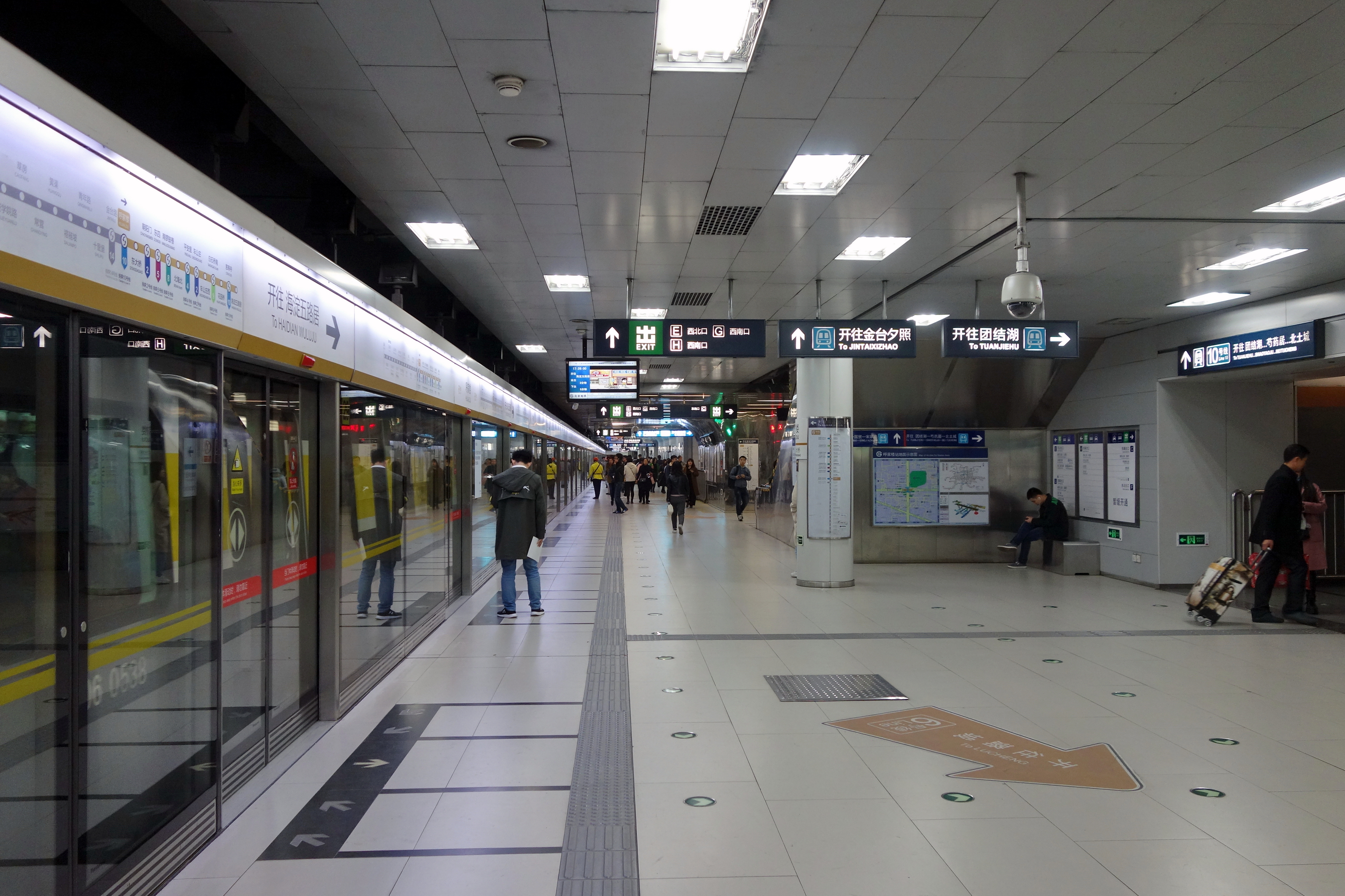 北京地铁6号线呼家楼站侧式站台